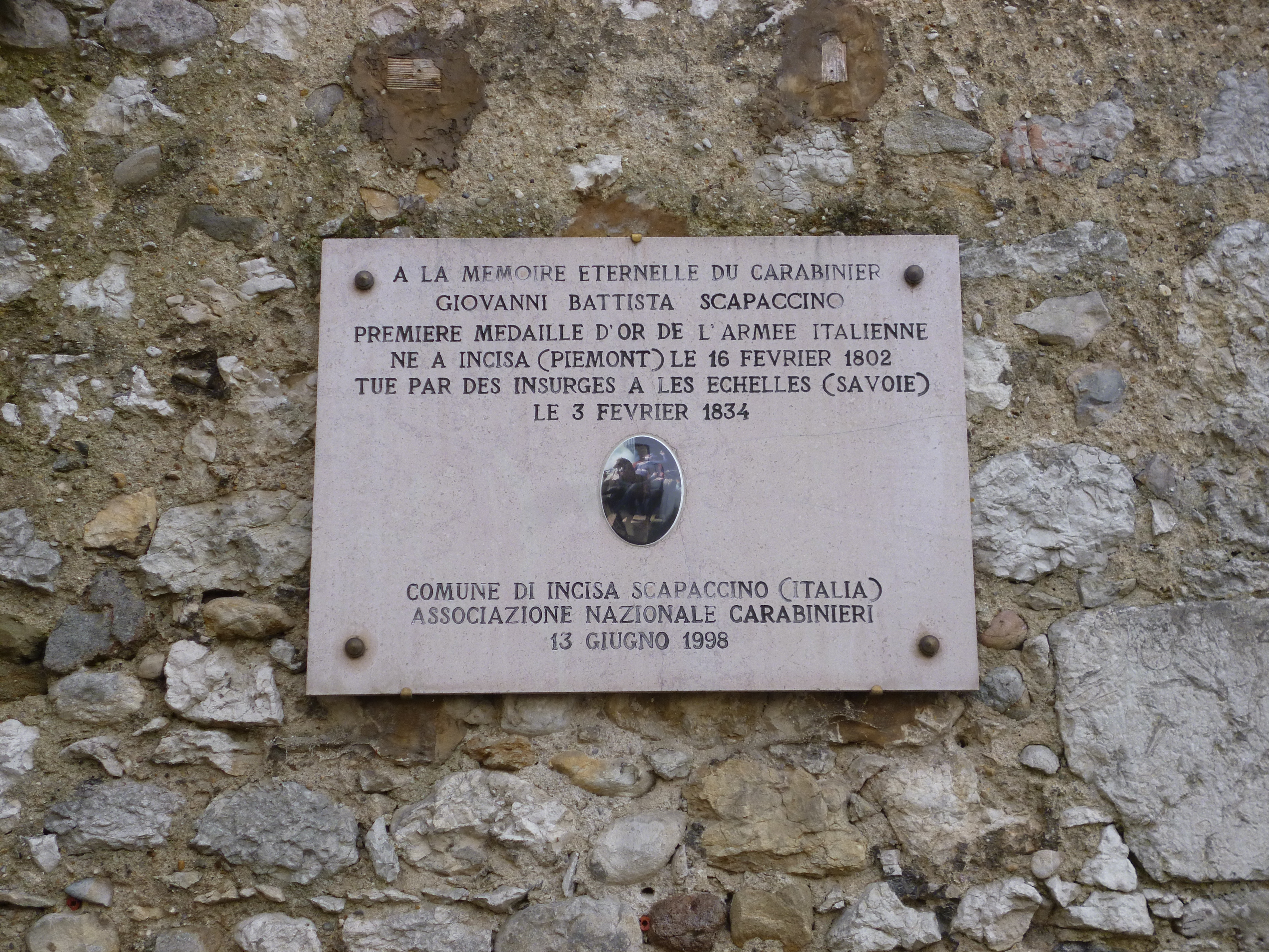 Targa commemorativa in memoria di Giovanni Battista Scapaccino, a Les Echelles (Savoia, Francia). Foto de 2016.